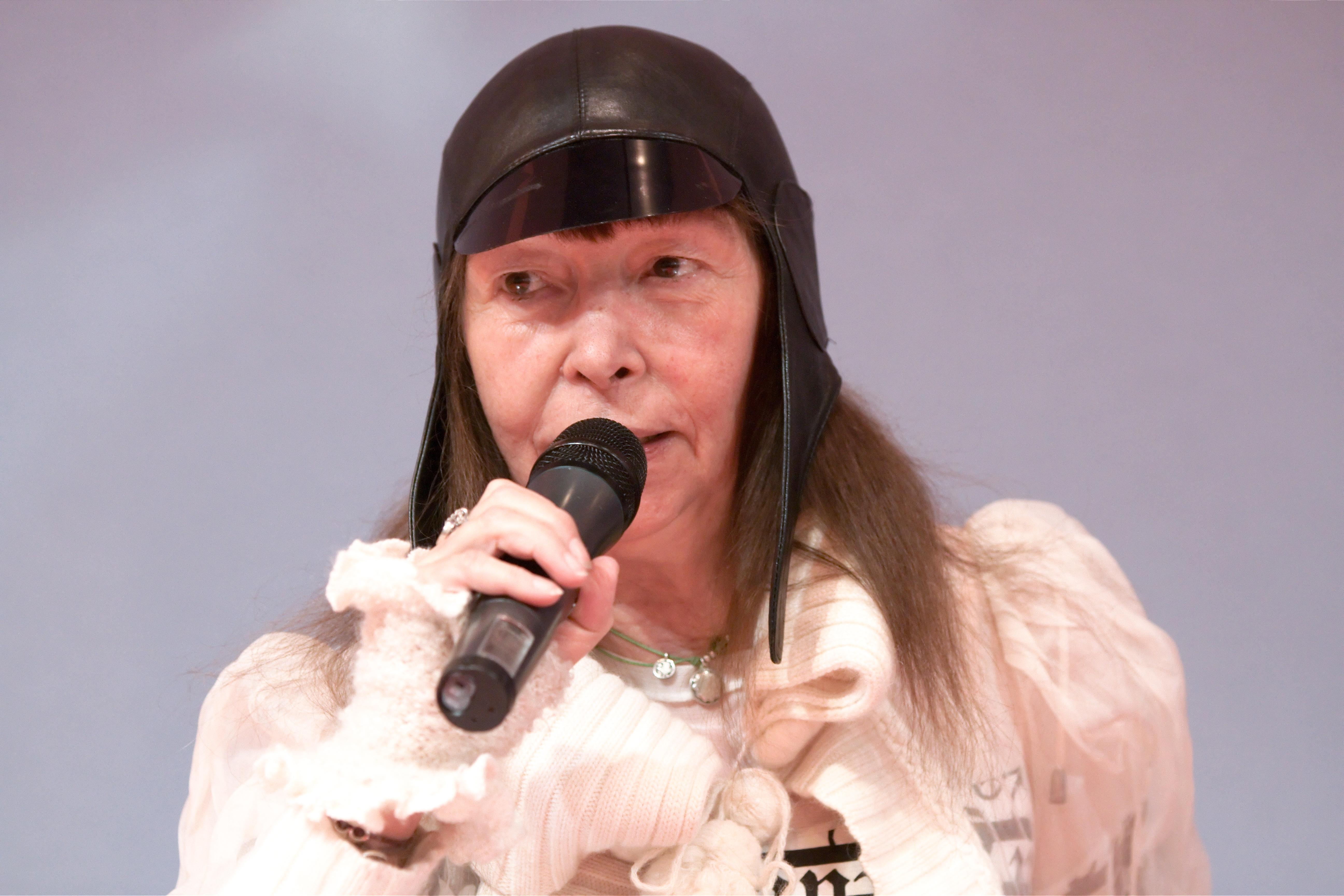 Brigitte Fontaine au Salon du livre de Paris pour une lecture de quelques-uns de ses poèmes.